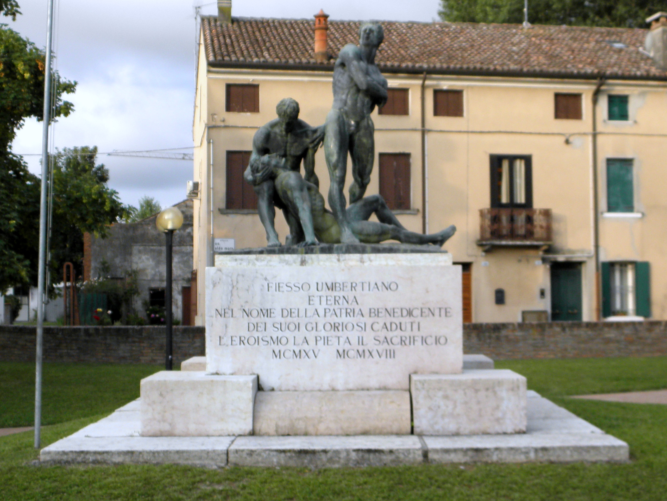 Fiesso Umbertiano: il Monumento ai Caduti della Prima Guerra Mondiale sito al centro della Piazza Aldo Moro.